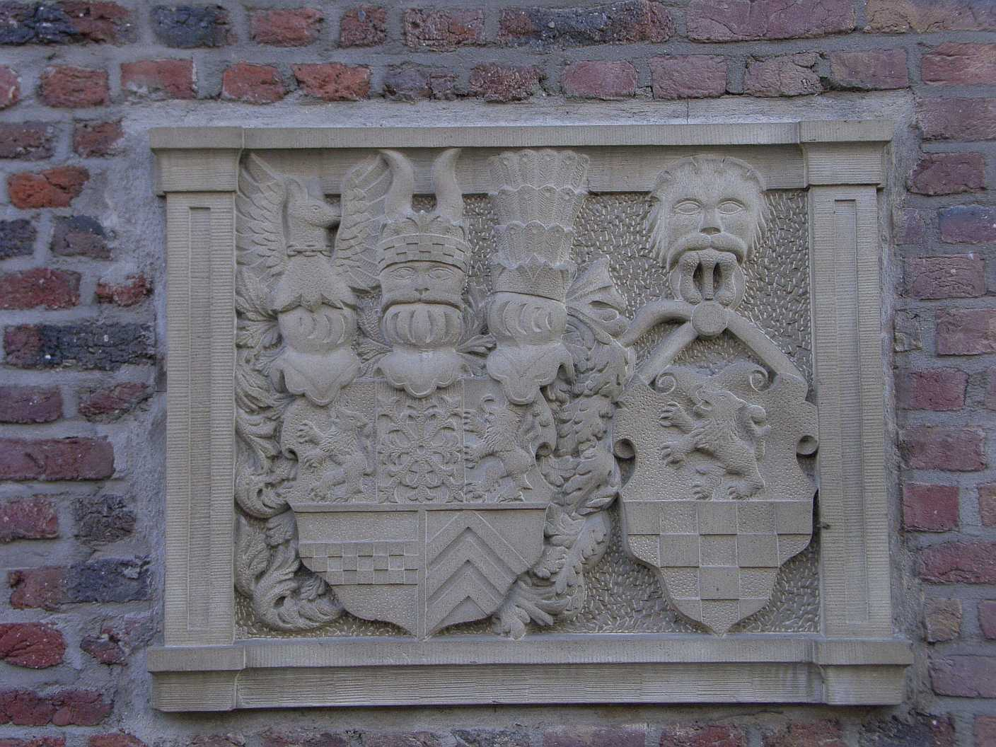 Kopie des Wappensteins am ehem. alten Rathaus (um 1600), Sandsteinreplikat von 1989 am Heimatmuseum Linnich